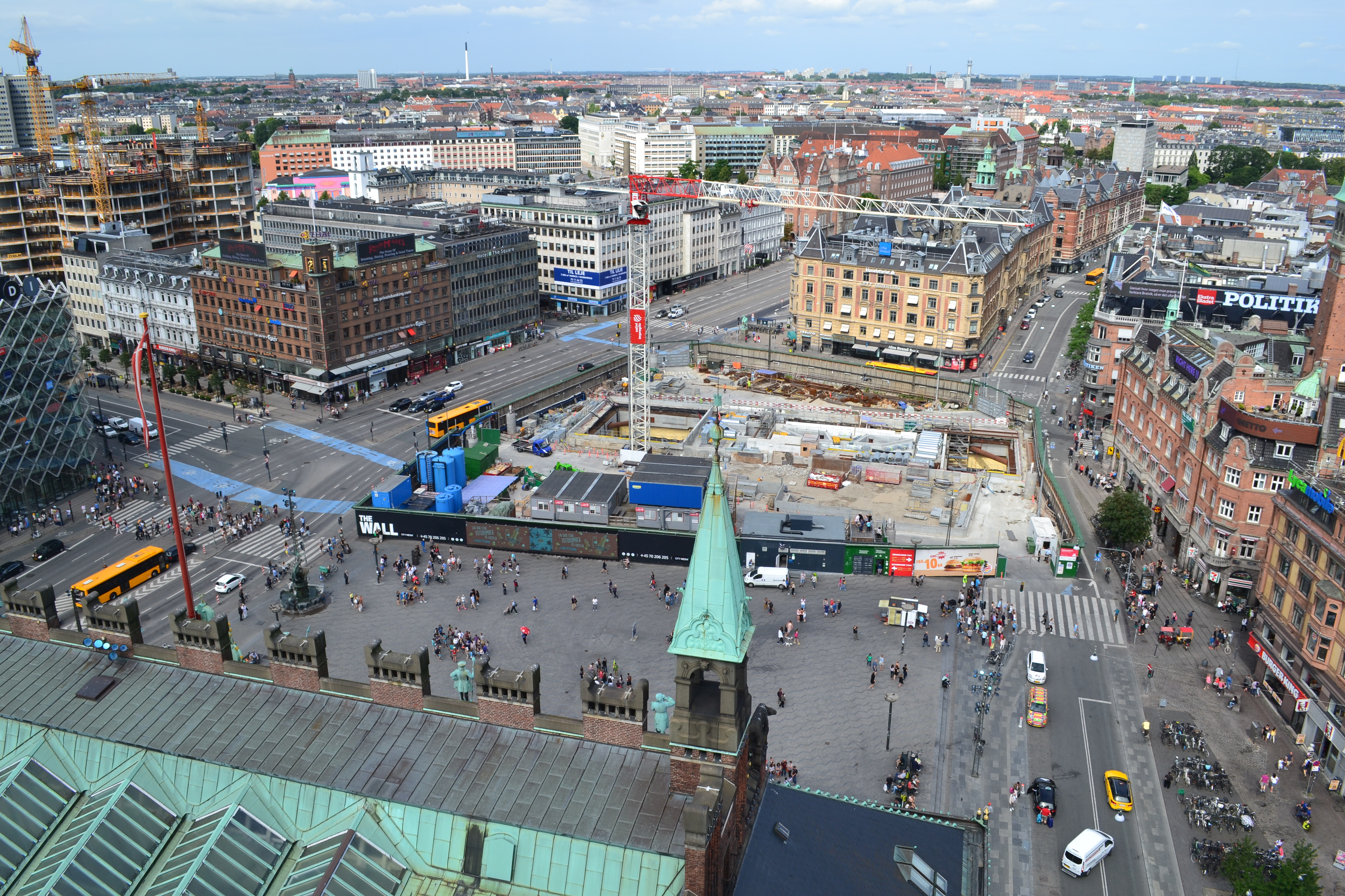 Rådhuspladsen in Kopenhagen tagsüber vom Rathausturm aus gesehen